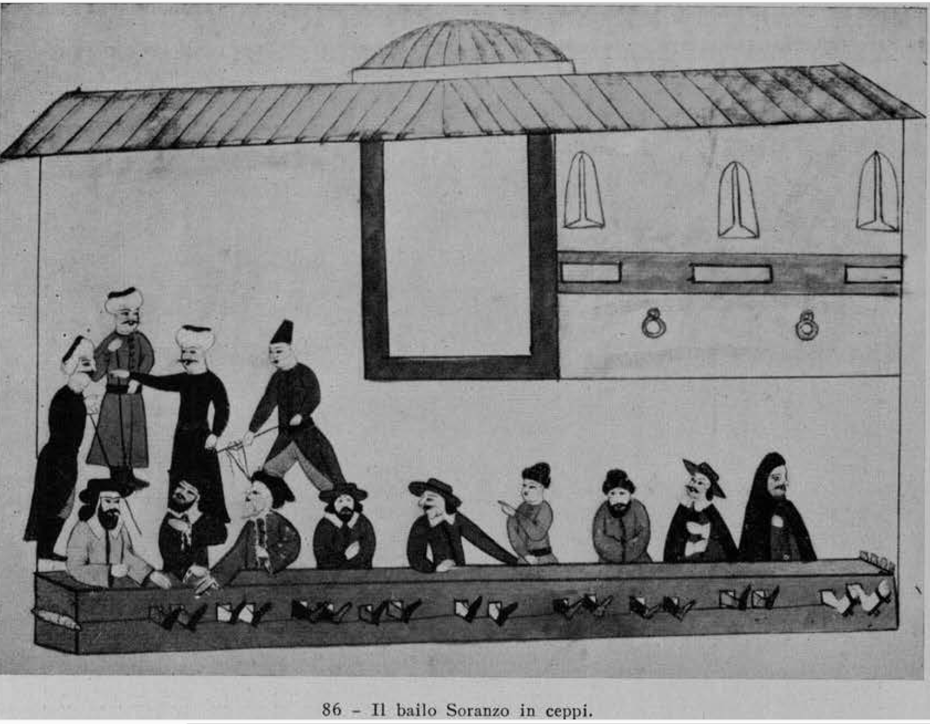 Il bailo Soranzo a ceppi